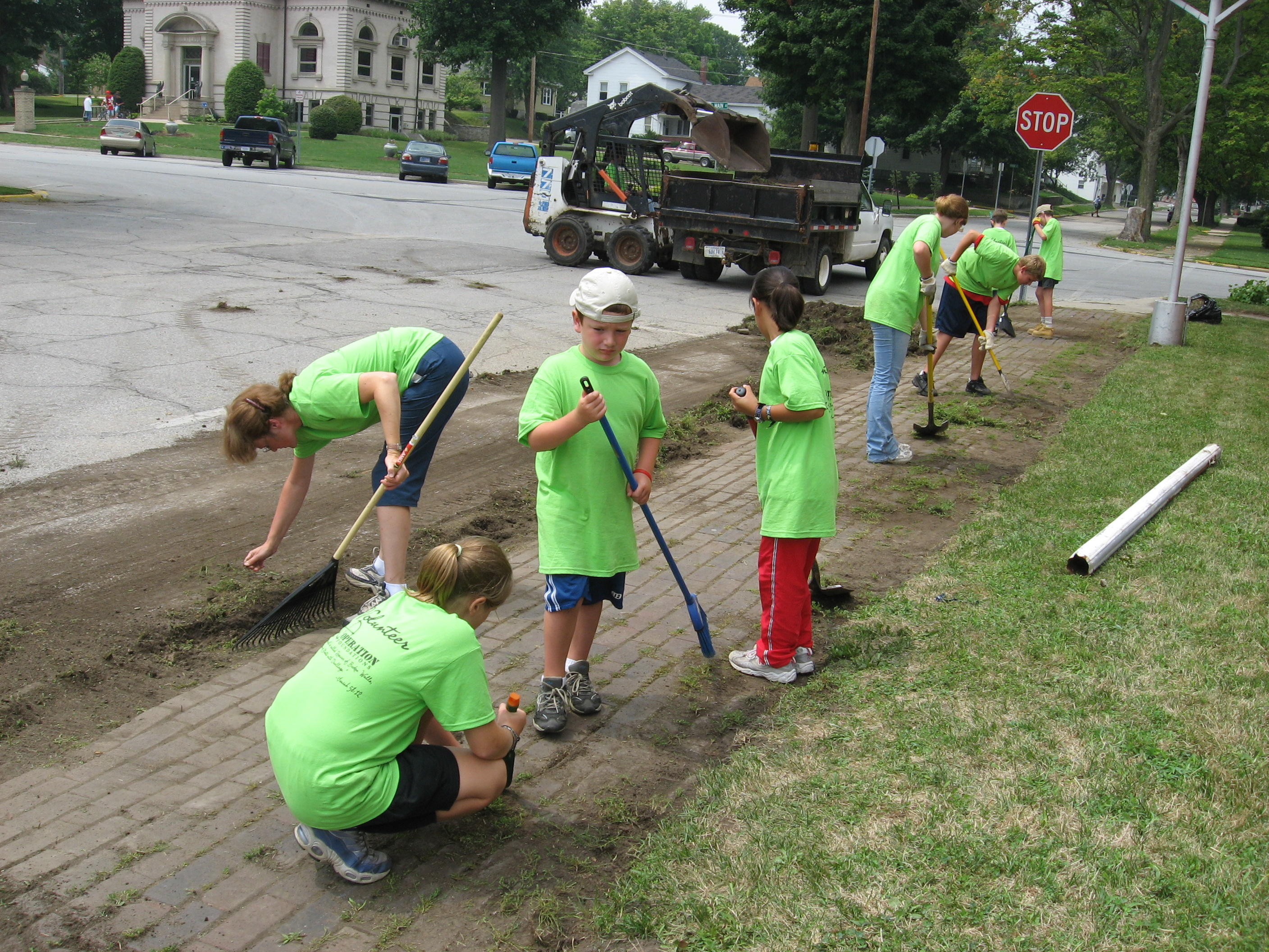 Children volunteering